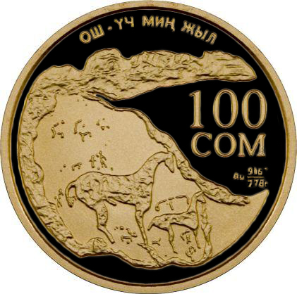 Памятная монета Кыргызстана - 3000-летие города Ош - 100 сом 2000 - Золото 999 Кыргызча: Ош уч миң жыл